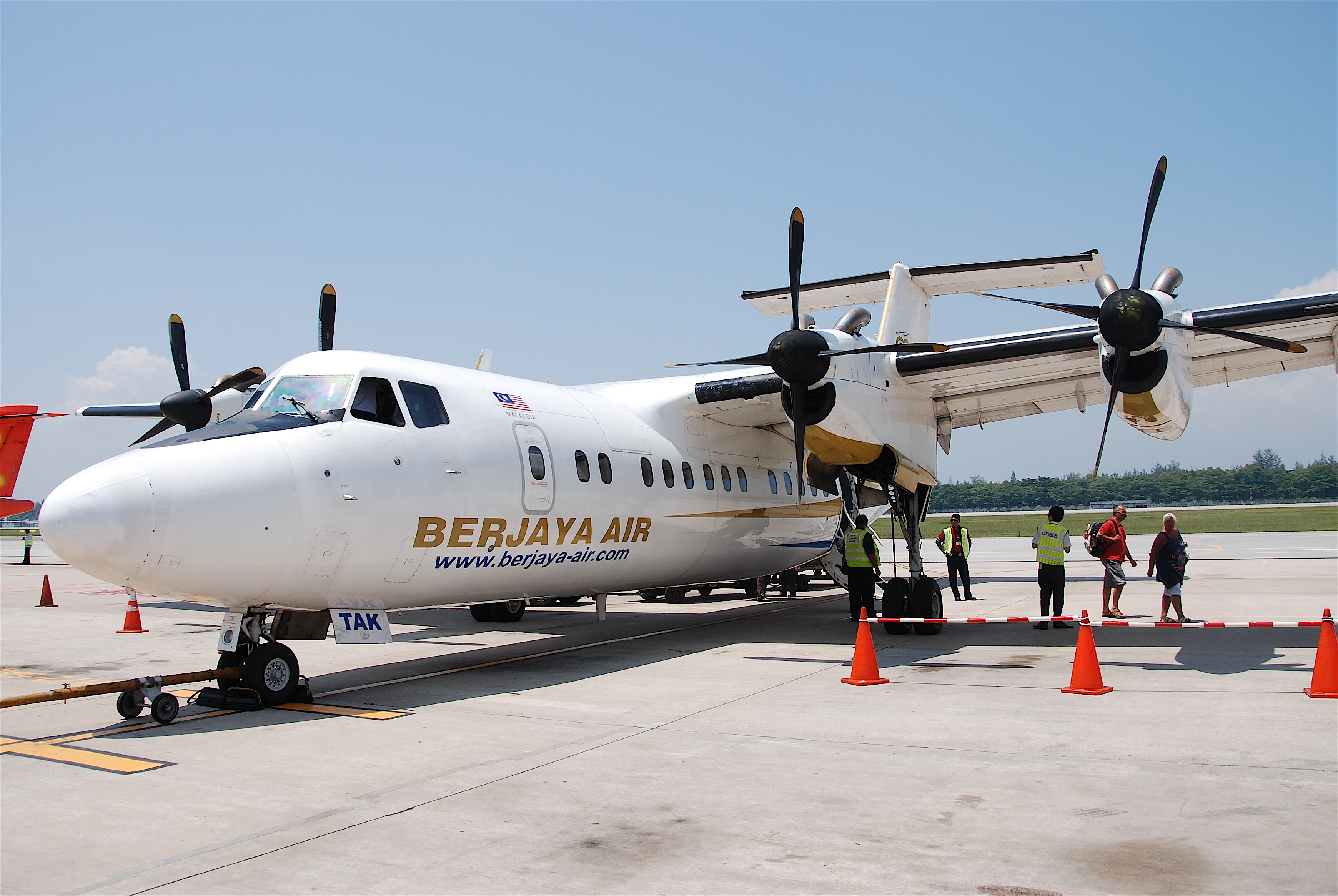 Berjaya Air DHC-7-110 Dash 7; 9M-TAK@SIN;12.08.2011/618as